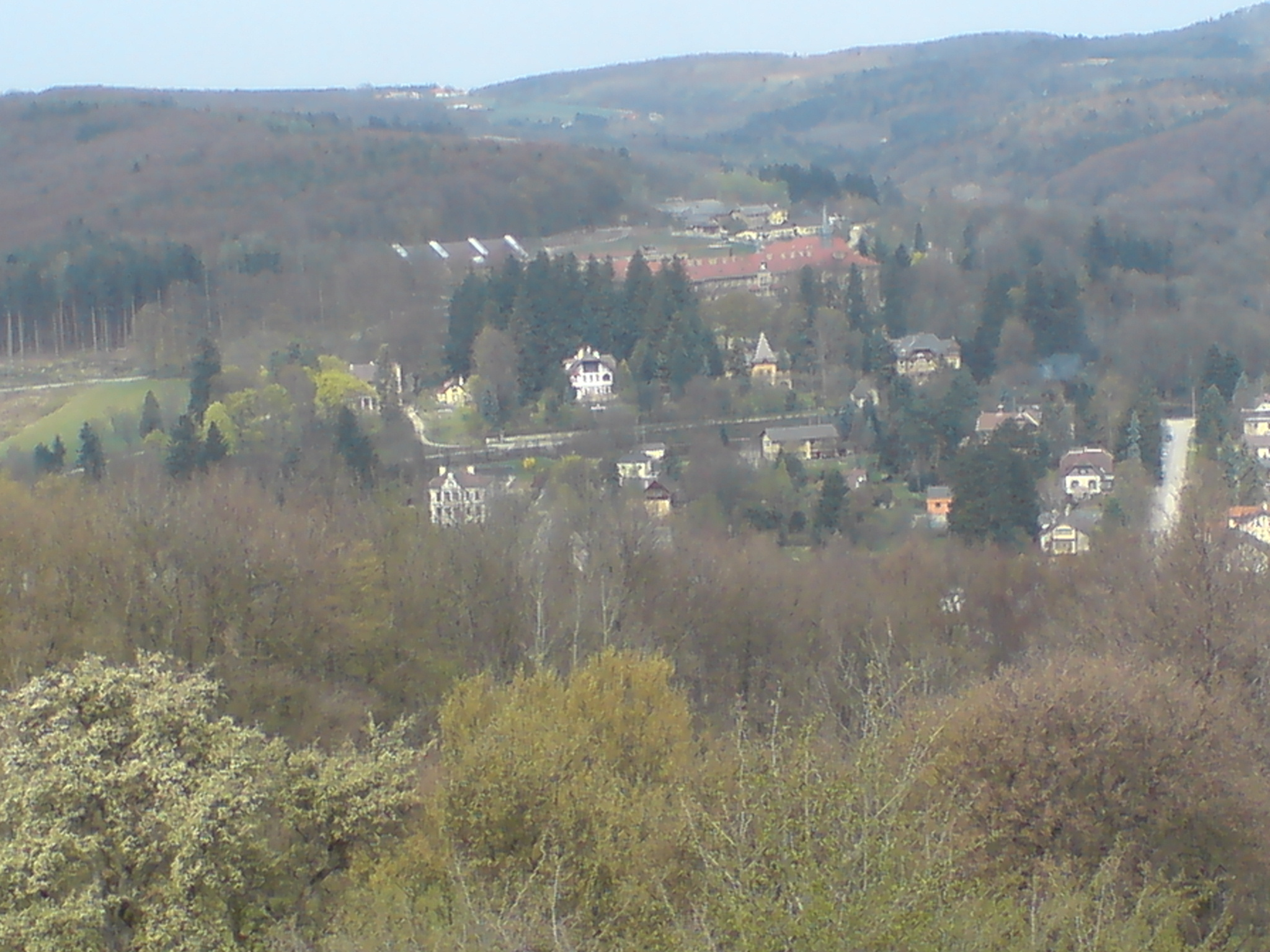 Schulzentrum Sacré Coeur Pressbaum, ehemaliges Nonnenkloster. Im Mittelgrund Villen aus der vorigen Jahrhundertwende